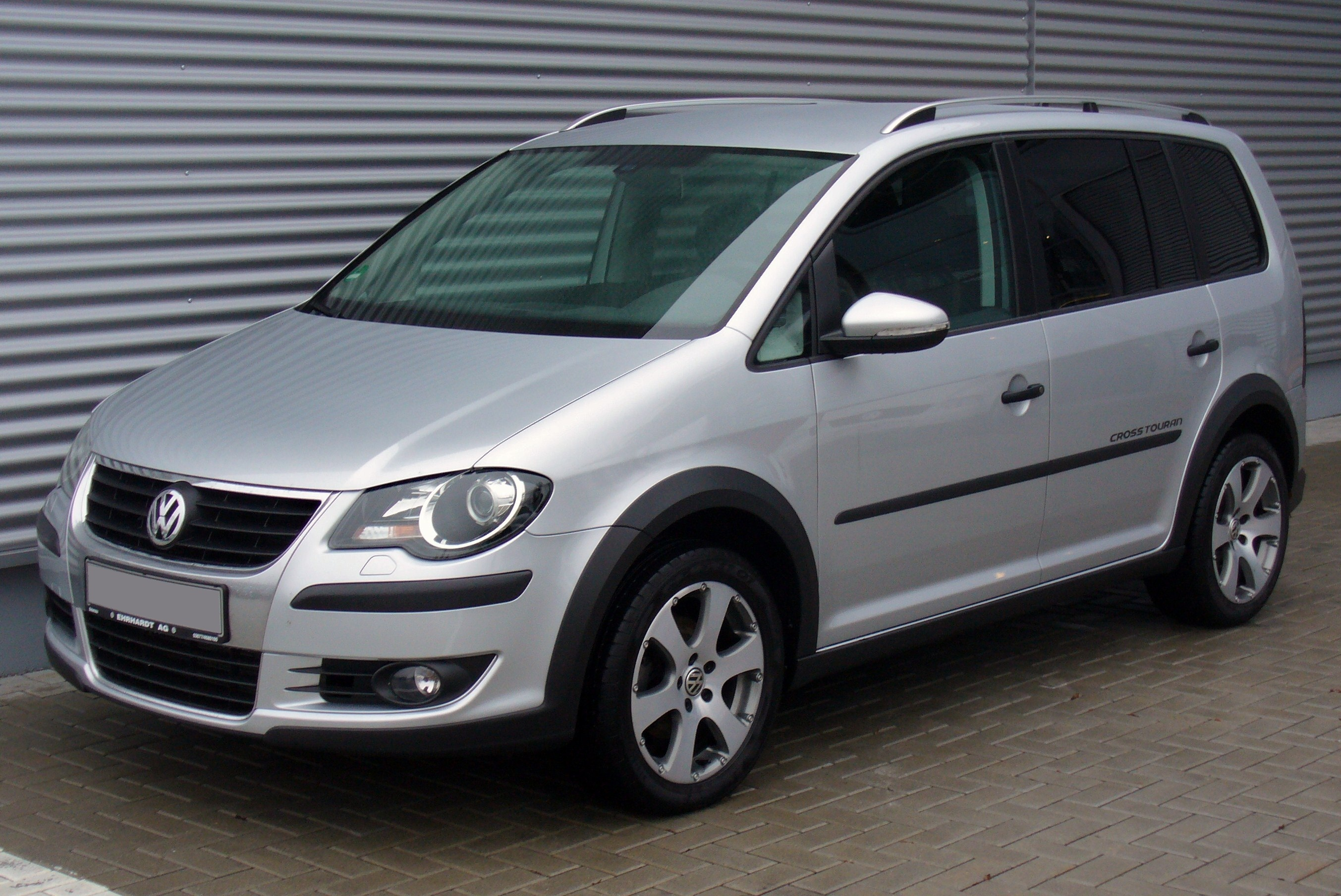 VW CrossTouran